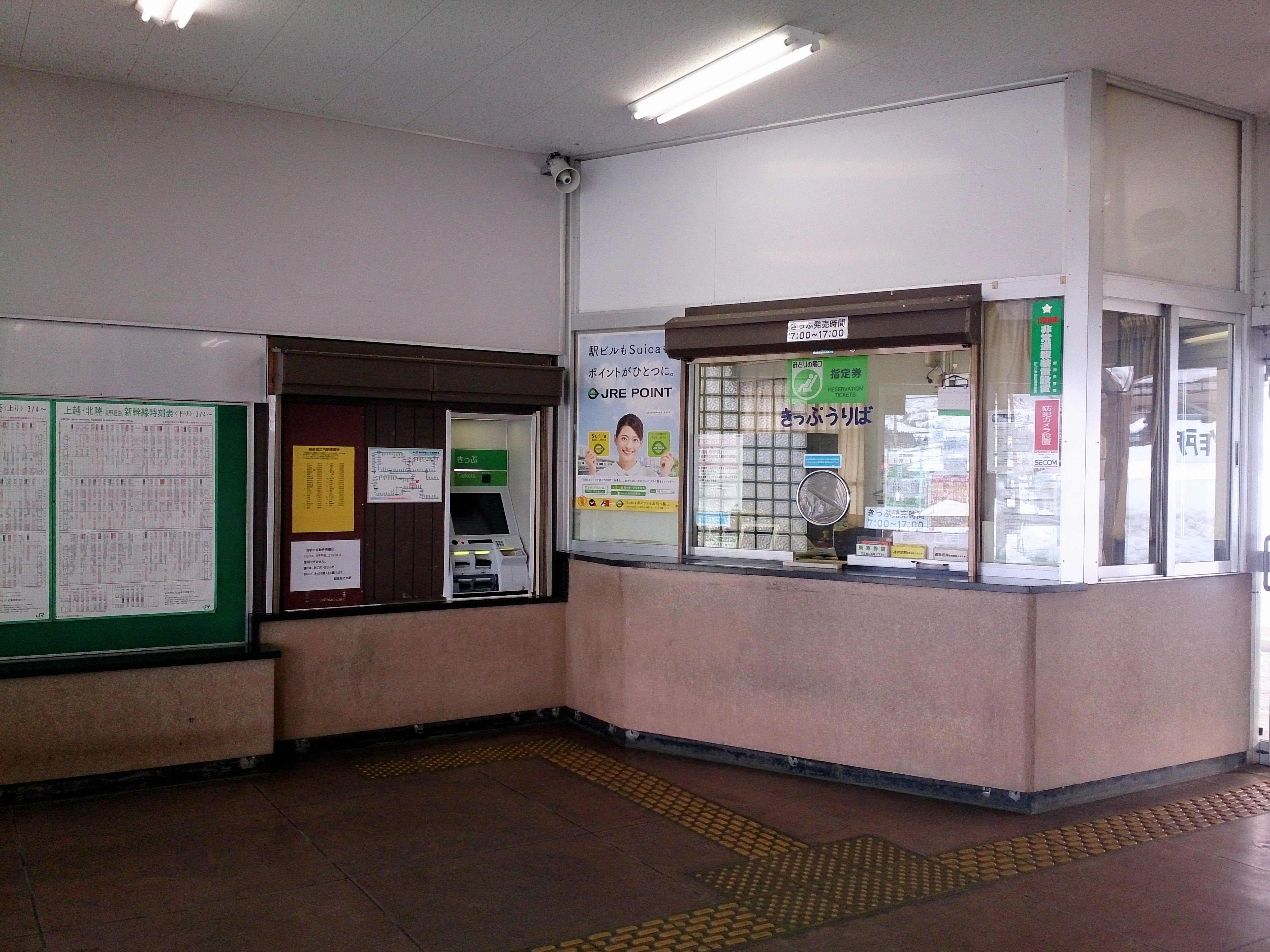 越後堀之内駅のみどりの窓口と自動券売機